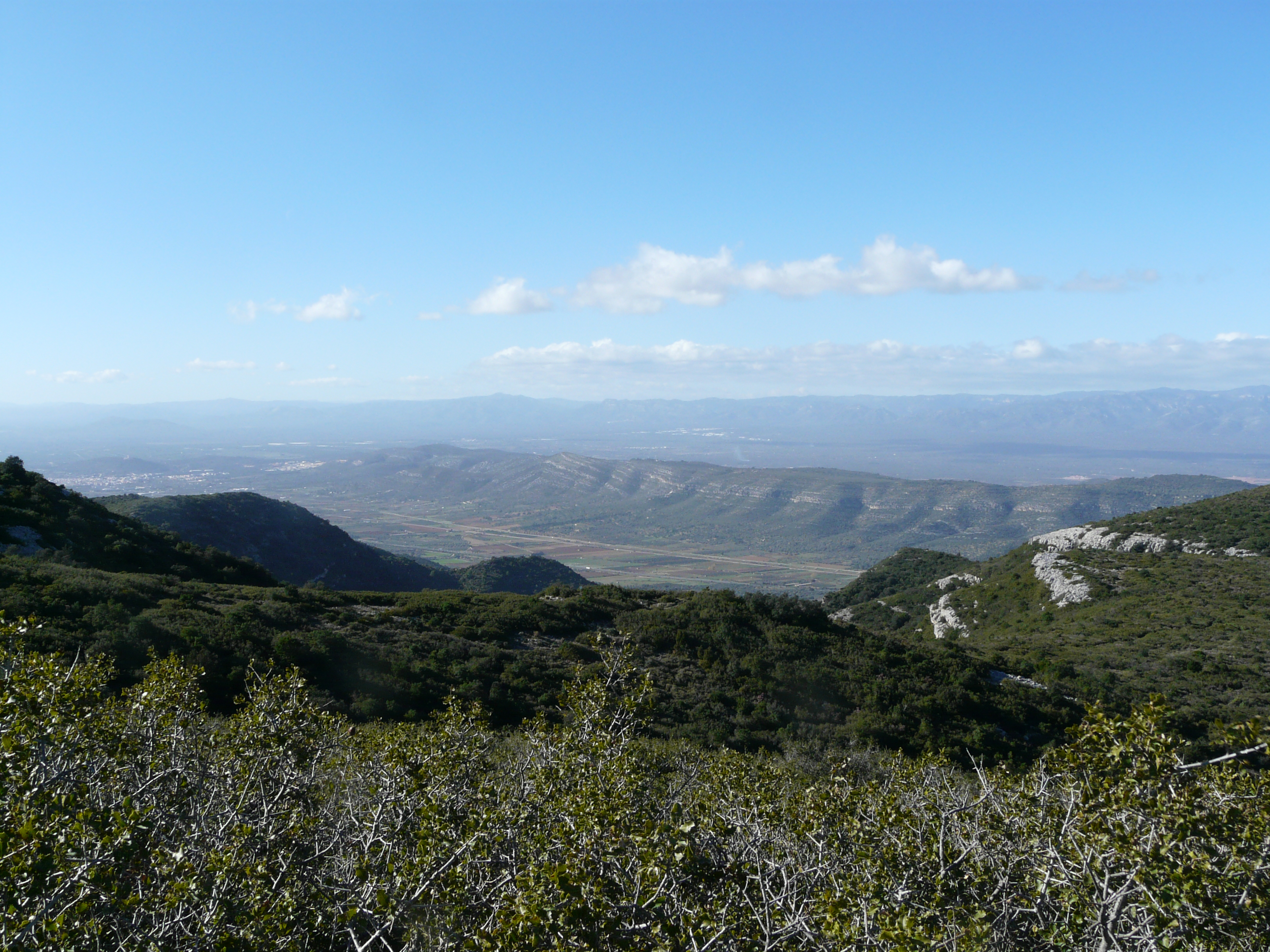 Serra de Godall (Montsià) (Godall, Ulldecona, Freginals i altres). This is a a photo of a natural area in Catalonia, Spain, with id: ES510263 Object location40° 38′ 24″ N, 0° 28′ 12″ E